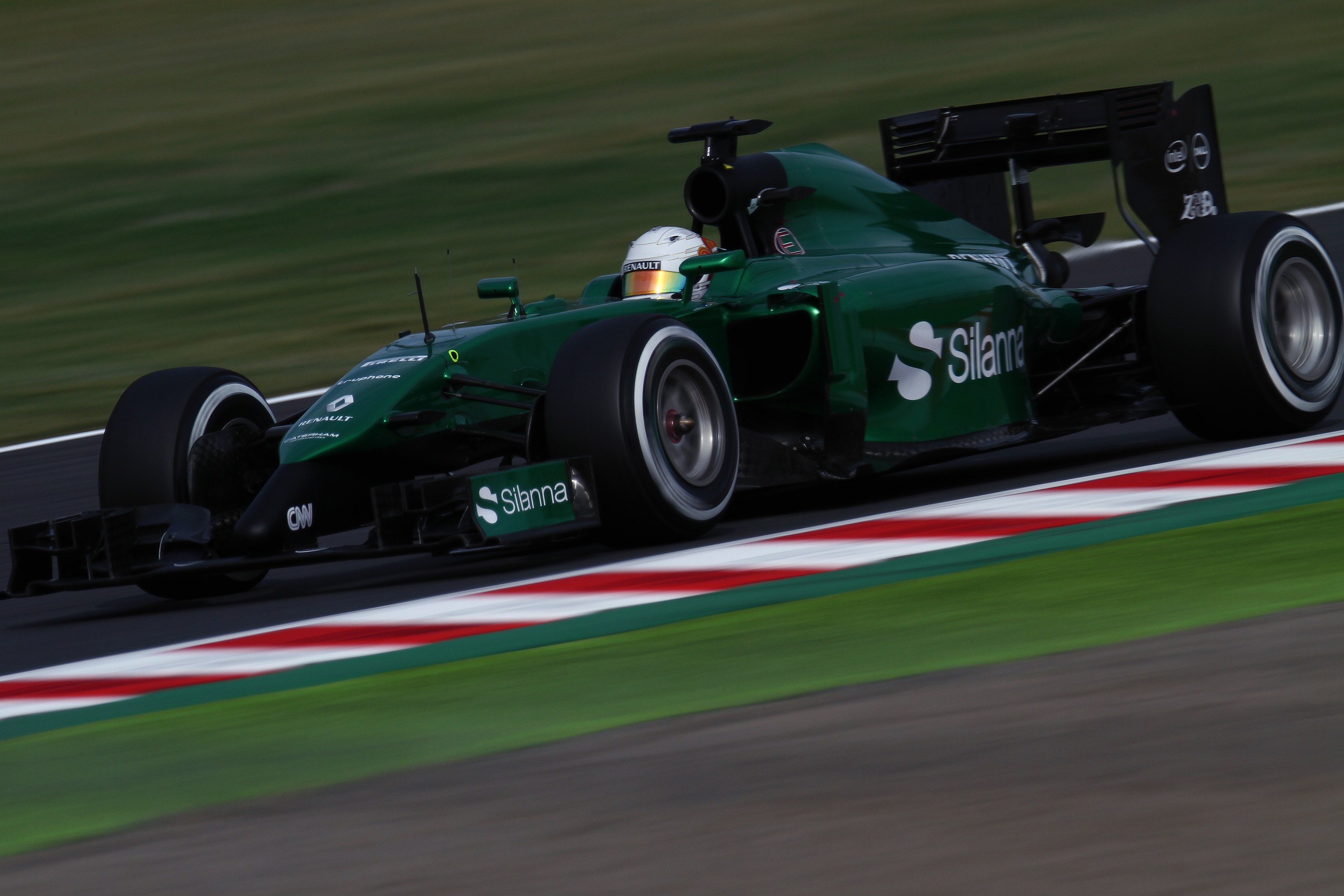 2014.10.4 F1 Rd.15 Suzuka Q1, Caterham F1 Team (CT05) 10 小林可夢偉 [IMG_3136ks]